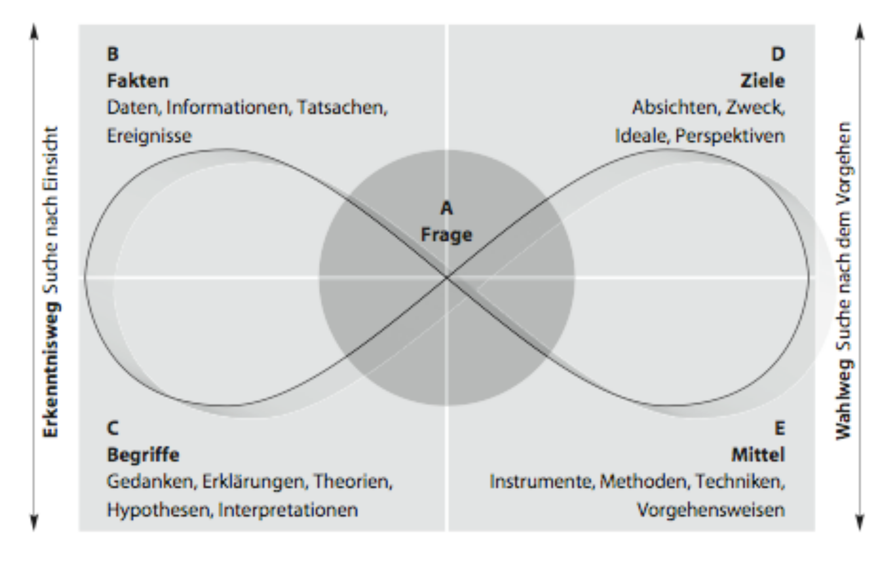 Dynamische Urteilsbildung als Modell dargestellt